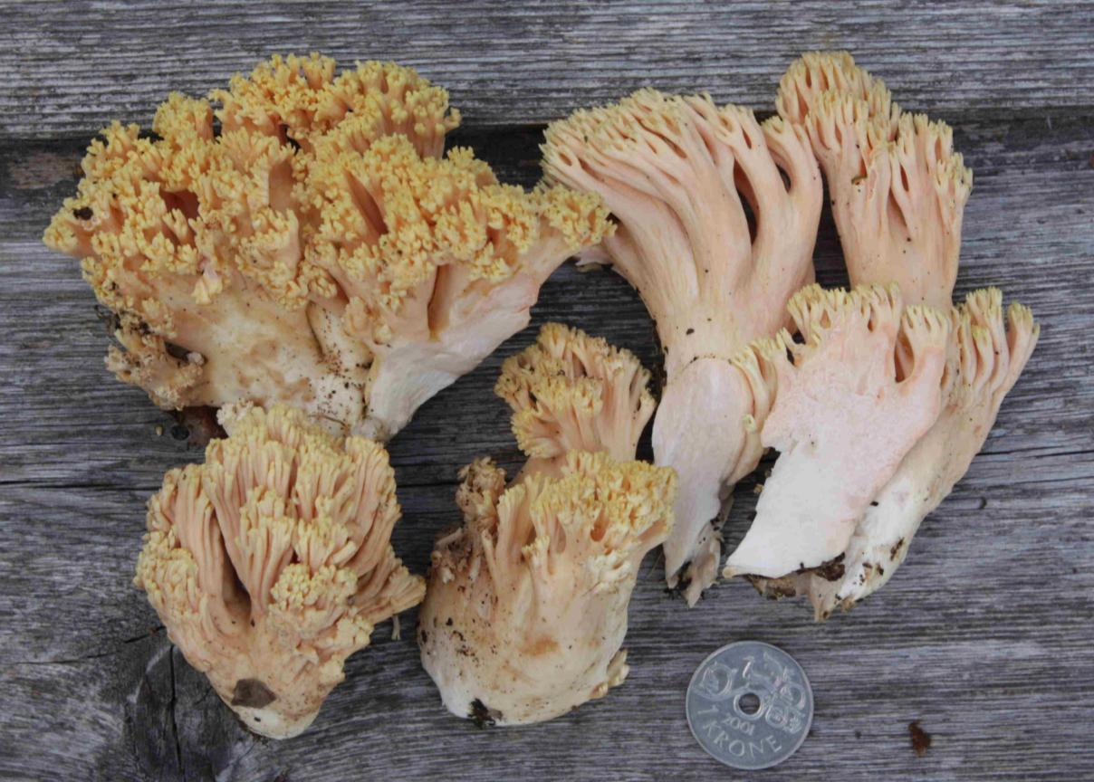 Ramaria formosa